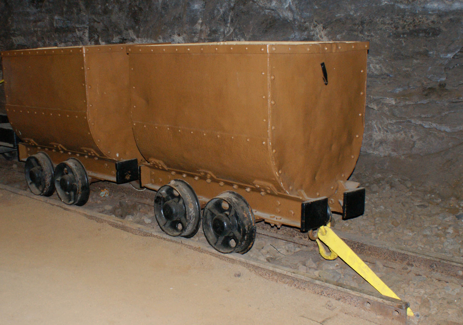 Ëttenger Buggie mat Hond (giel), als Exponat am Rëmelenger Musée des Mines.